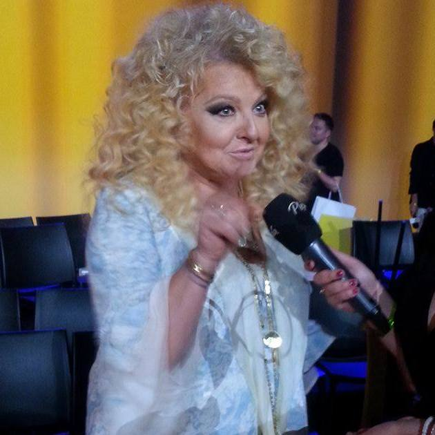 Magda Gessler, prowadząca program "Kuchenne rewolucje", podczas prezentacji jesiennej ramówki TVN w sierpniu 2016 roku.